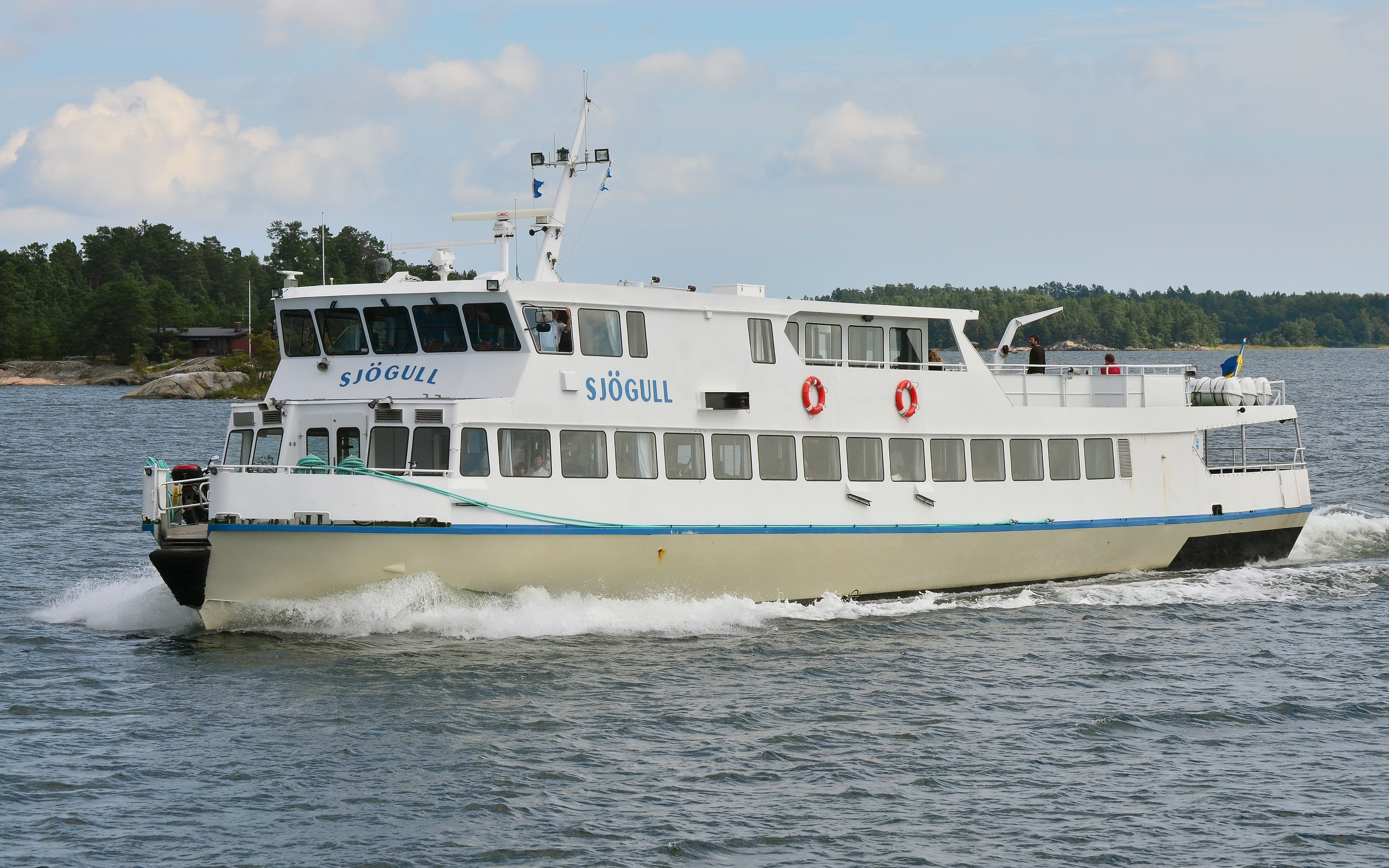 M/S Sjögull